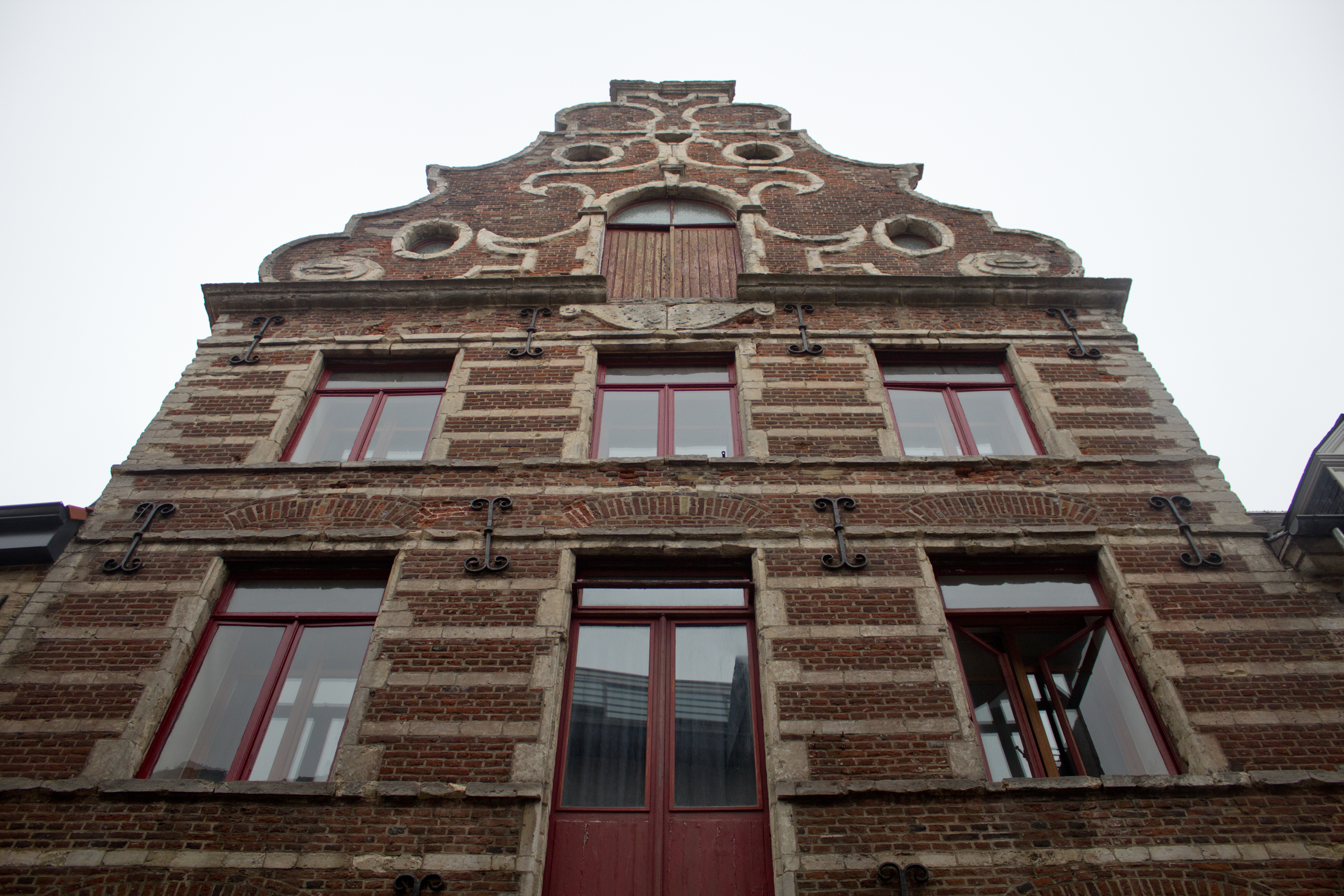 College van Luik, Muntstraat, Leuven.